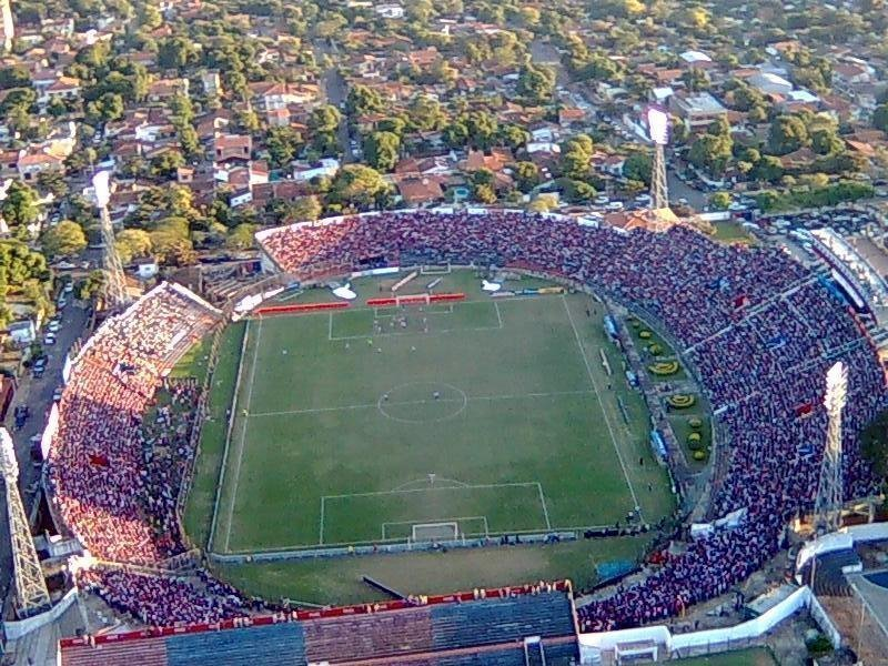 Es una de los estadio mas grandes del Paraguay, allí se disputaron partidos internacionales por Copa America.